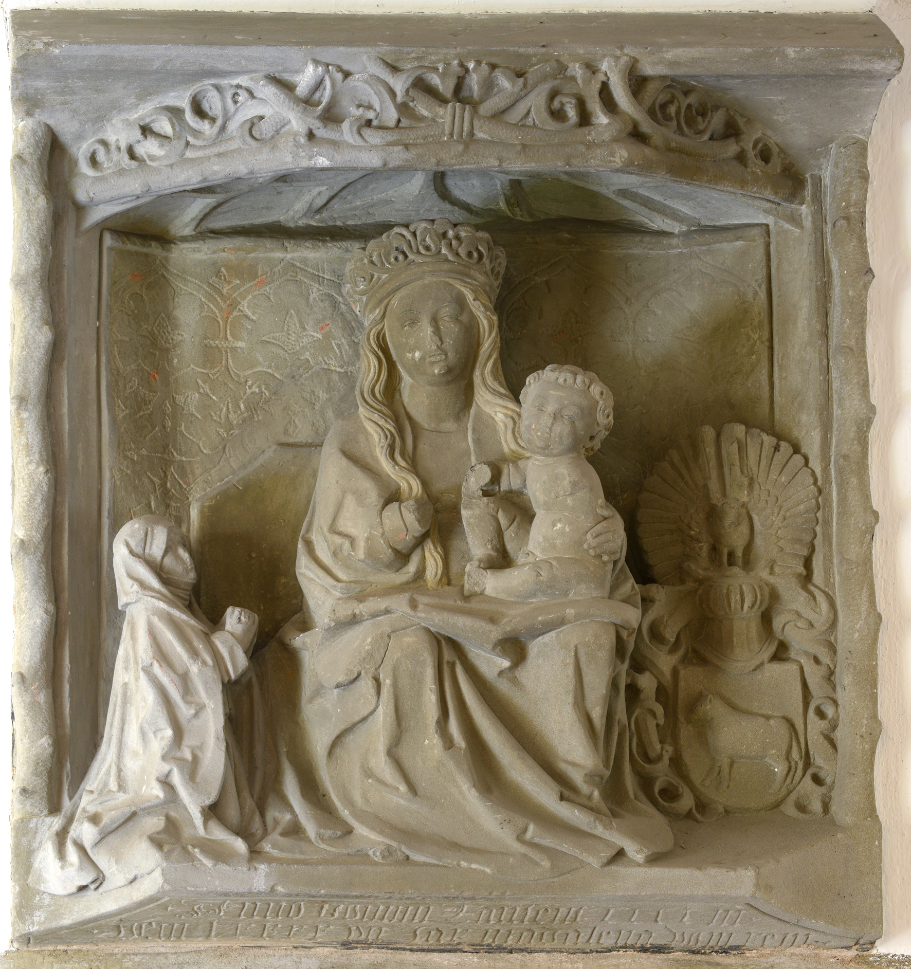 Stifterrelief mit Madonna und Kind und der knieenden Stifterin Magdalena vom Rein, Sandstein, 1497 datiert